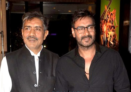 Ajay Devgn and Prakash Jha